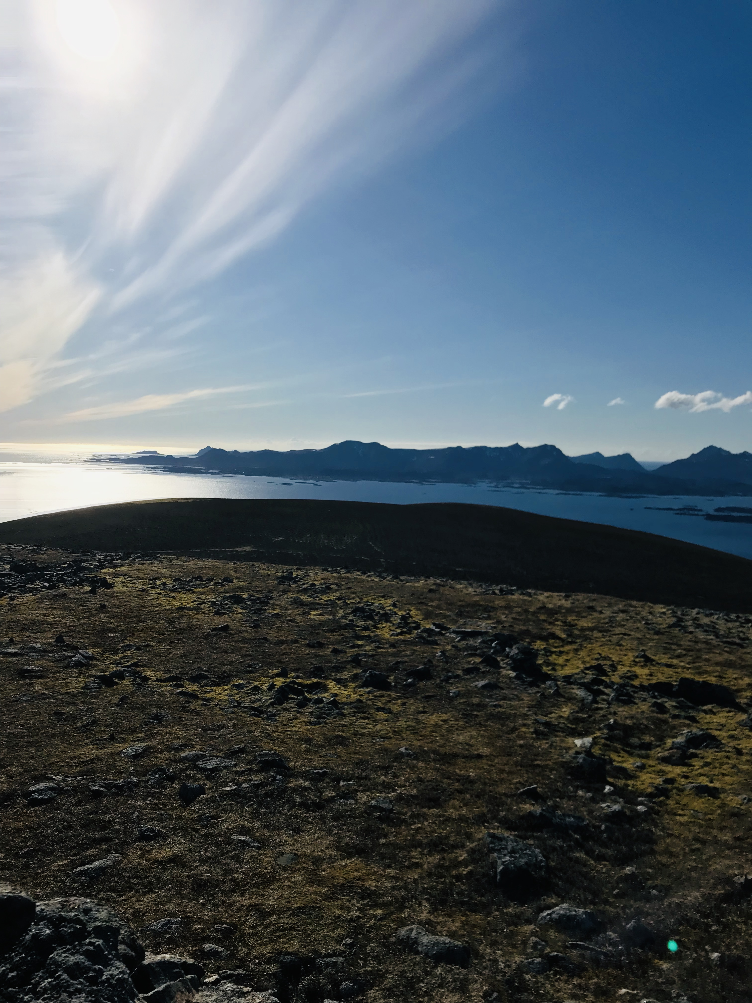 Bø-sida av Langøya sett fra Veten i Hadsel. Noen av de mest karakteristiske landemerkene innenfor og nært Eidsfjorden er tatt med, som Litløya (øverst til venstre mot horisonten), Gaukværøya (stikker opp bak Vinje), Vetten (midt i bildet over Eidsfjorden) og litt av Veggfjellet (stikker opp helt øverst til høyre)